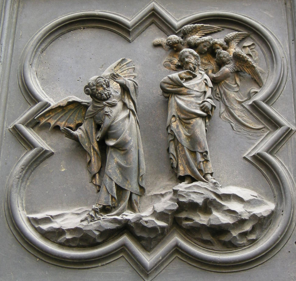 6 Tentazioni nel deserto